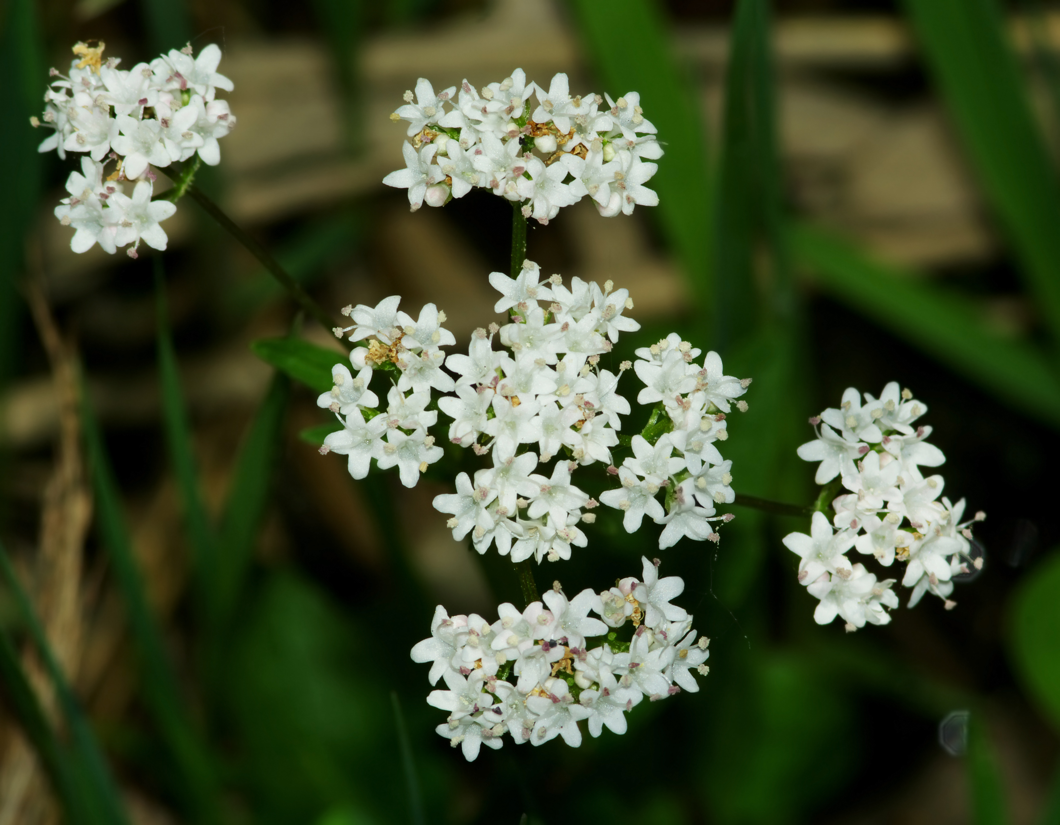 Kozłek całolistny (Valeriana simplicifolia) na terenie użytku ekologicznego Młaki nad Pogorią